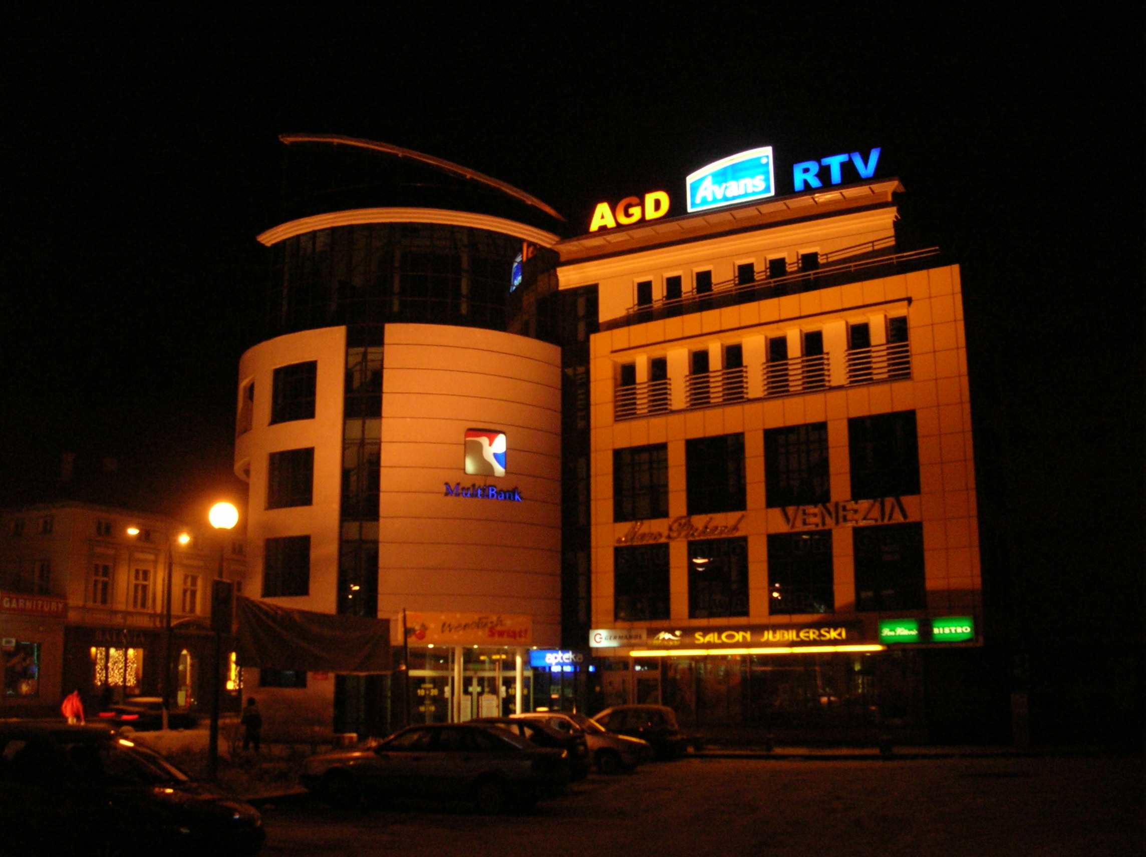 Gorzów - CH Park 111 przu ul.Sikorskiego nocą Autor : Bartek Wawraszko